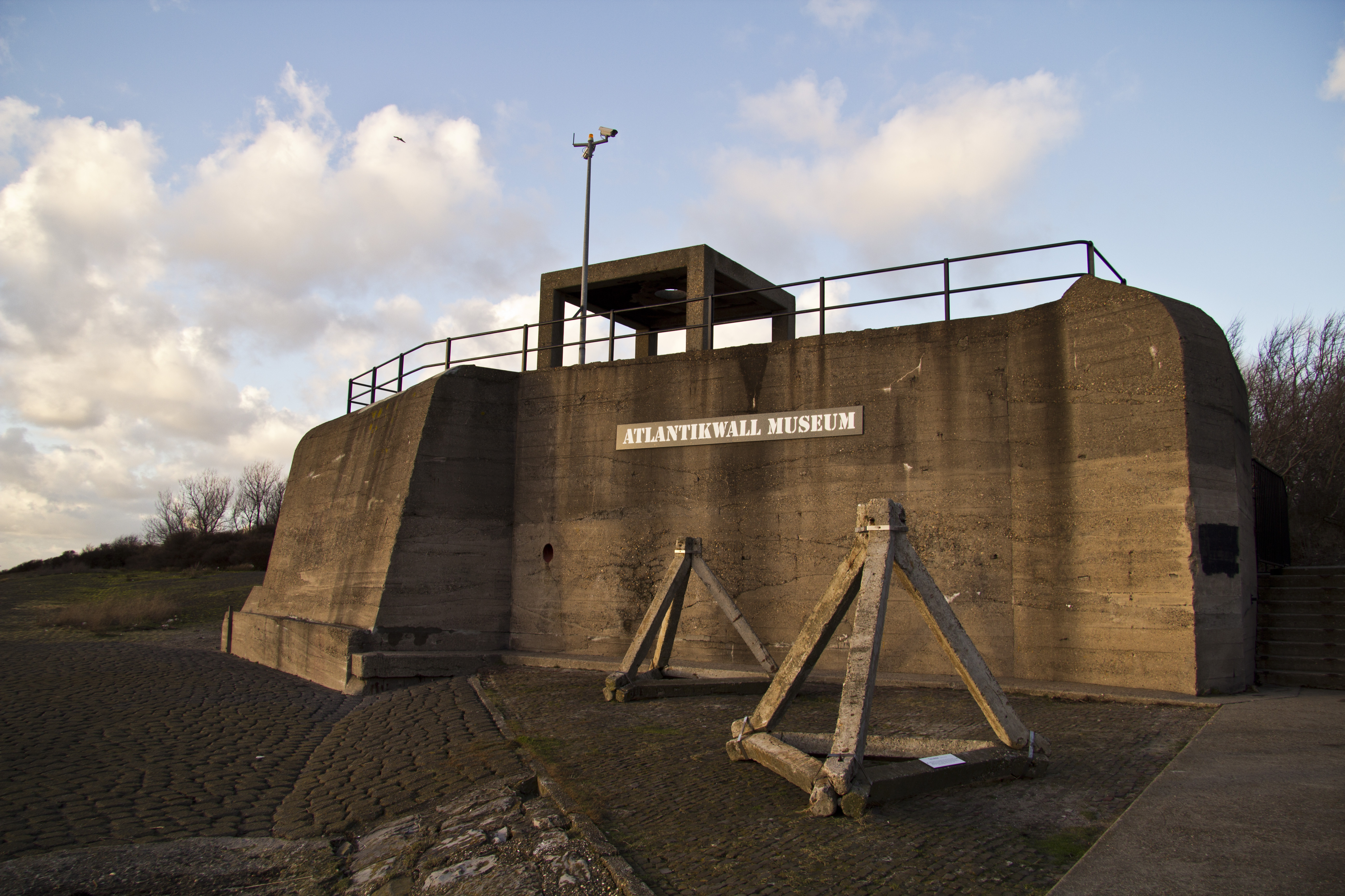 Atlantic wall, Hoek van Holland